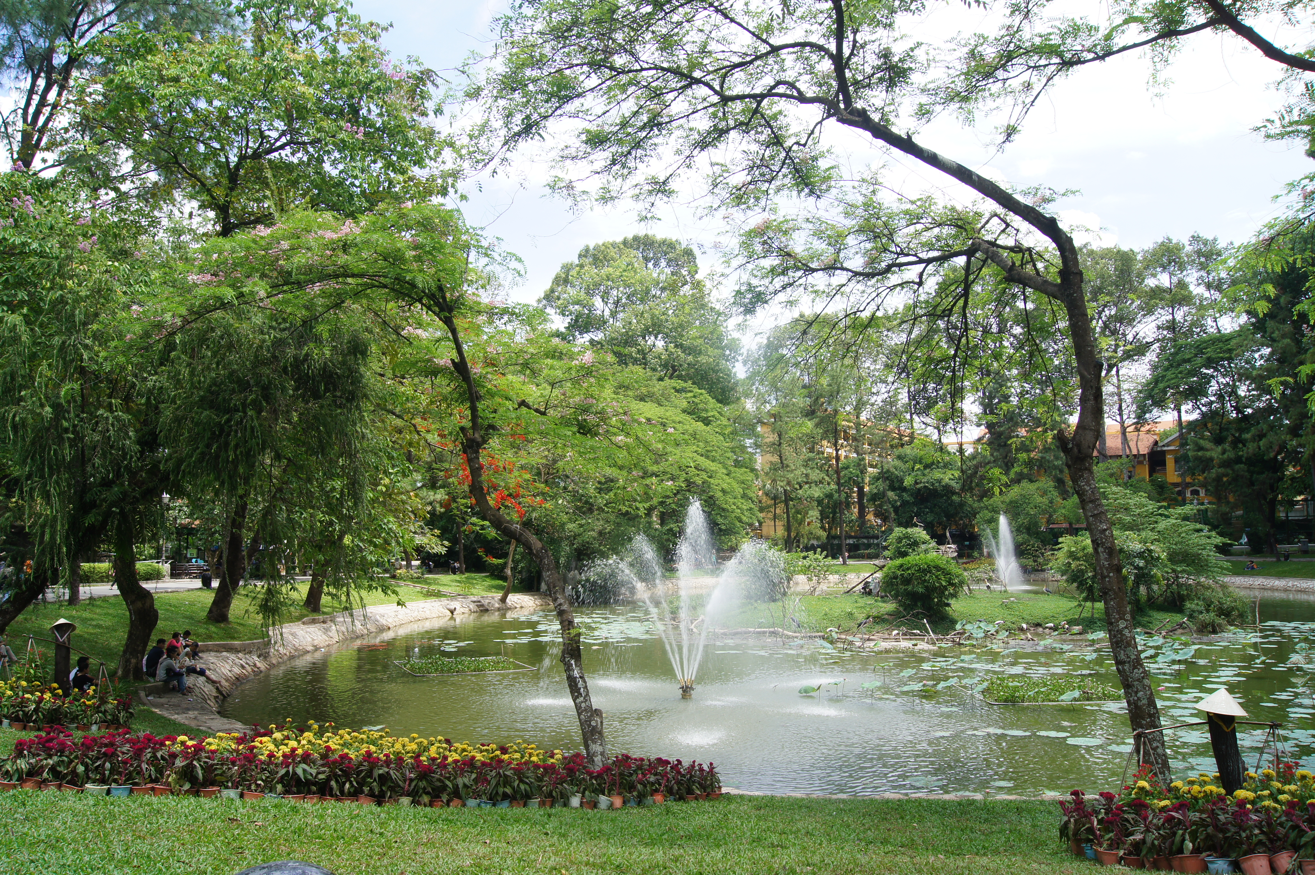 Hồ nước ở giữa Thảo Cầm Viên Tp. Hồ Chí Minh